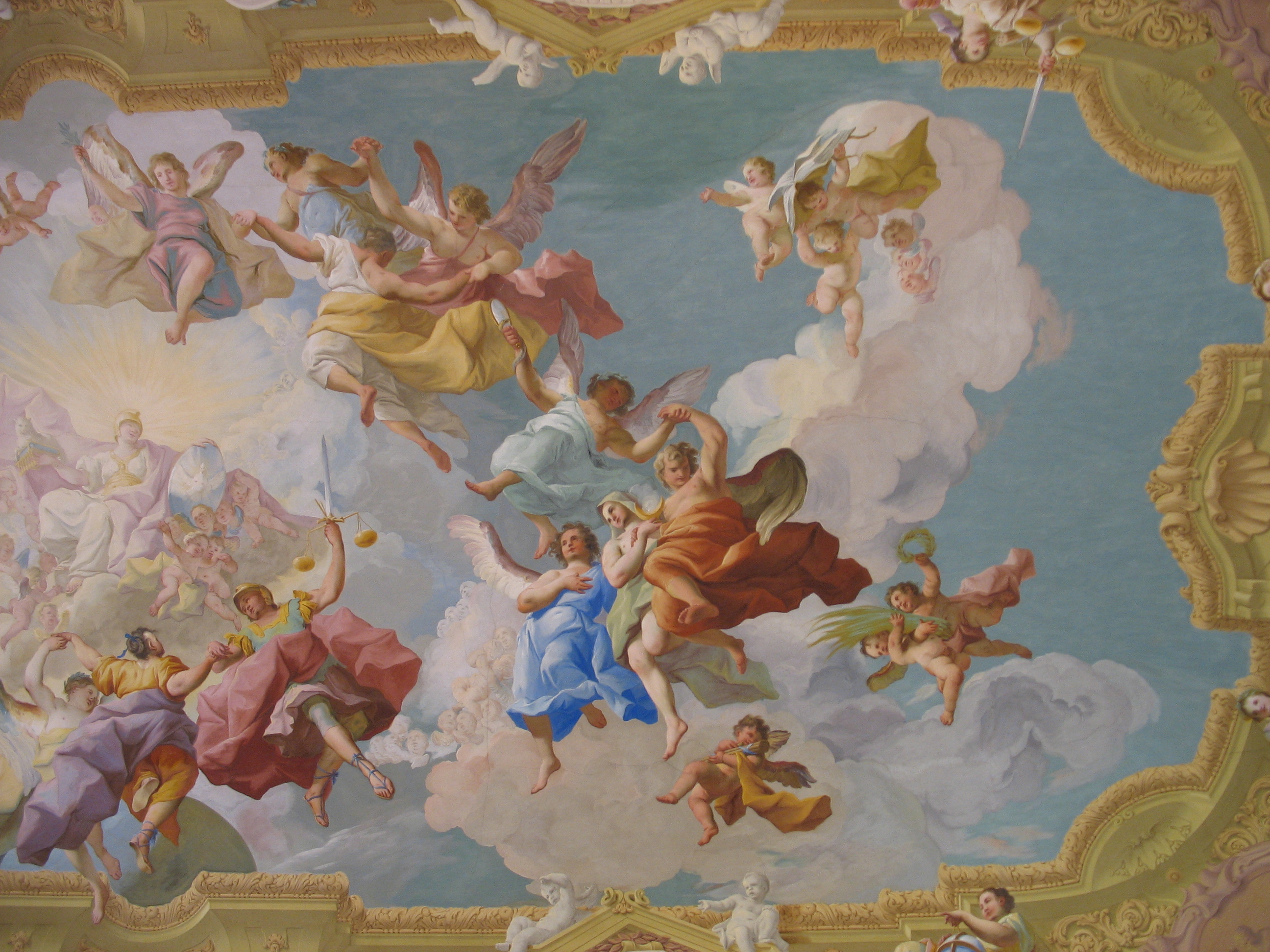 Stift Melk, Bibliothek, Deckengemälde